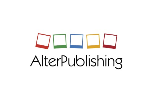 Logo AlterPublishing